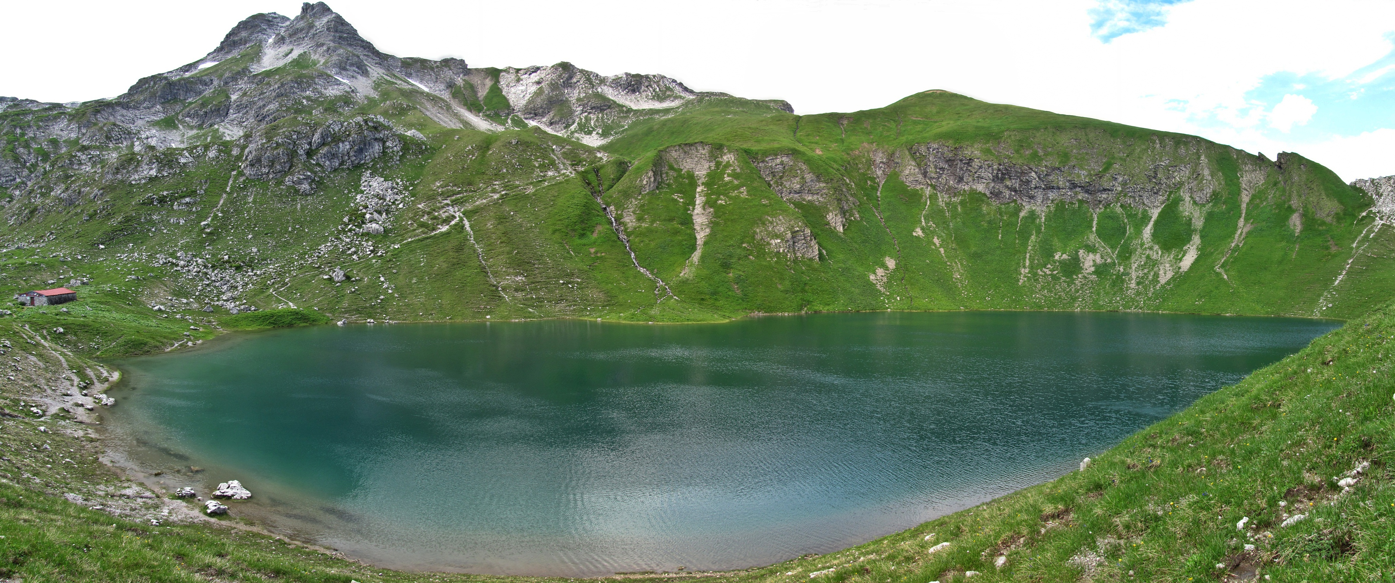 Engeratsgundsee (1876 m) und Seehütte aus Osten gesehen.